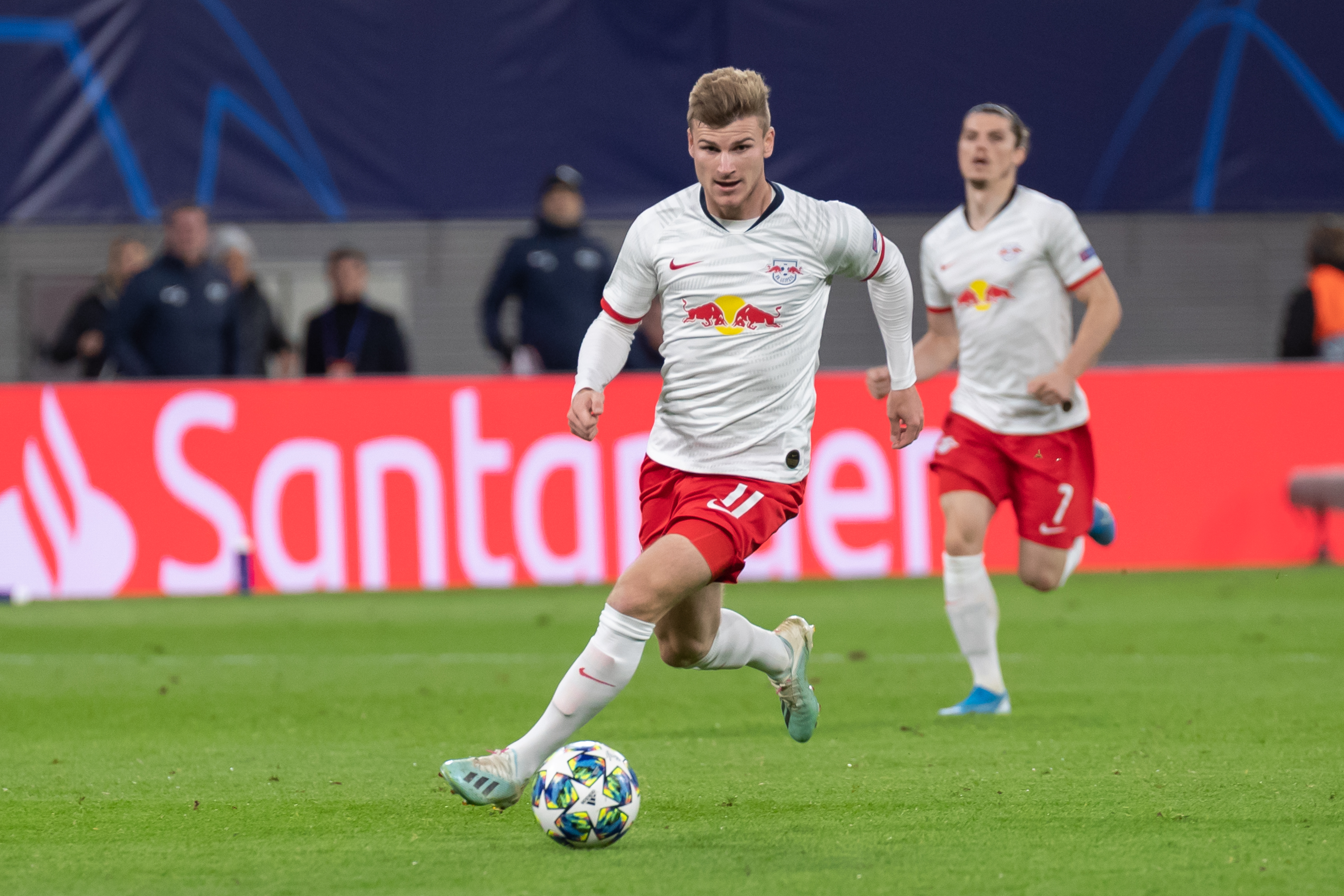 Fußball, Männer, UEFA Champions League, RB Leipzig - Olympique Lyonnais; Timo Werner (RB Leipzig, 11)